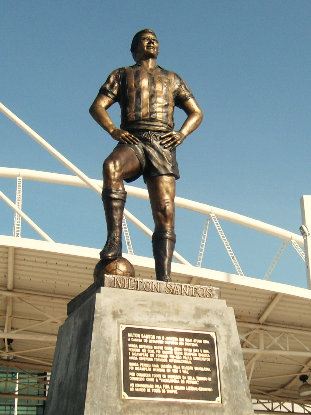 Estátua de Nílton Santos, localizada à ala oeste do Estádio Olímpico João Havelange.